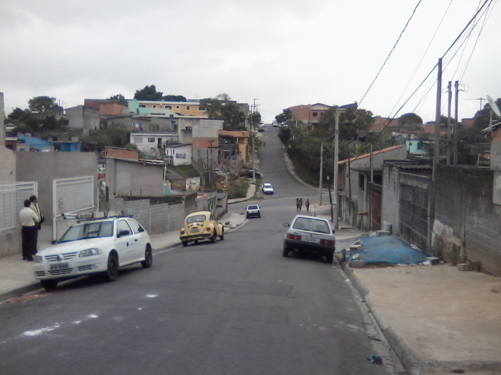 Vista da Rua Serra da Cantareira, Jardim Paineira, no município de Itaquaquecetuba.